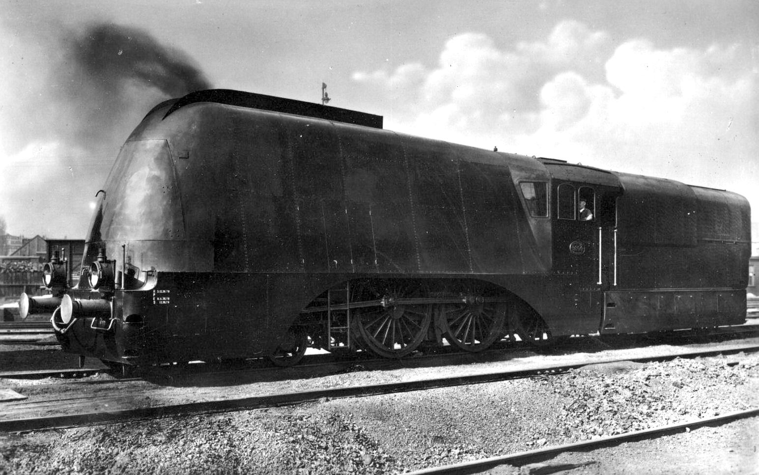 Stoomlocomotief nr. 3804 (serie 3700/3800) van de NS met stroomlijnbekleding (bijnaam 'Potvis'); circa 1936. Collectie van het Utrechts Archief.